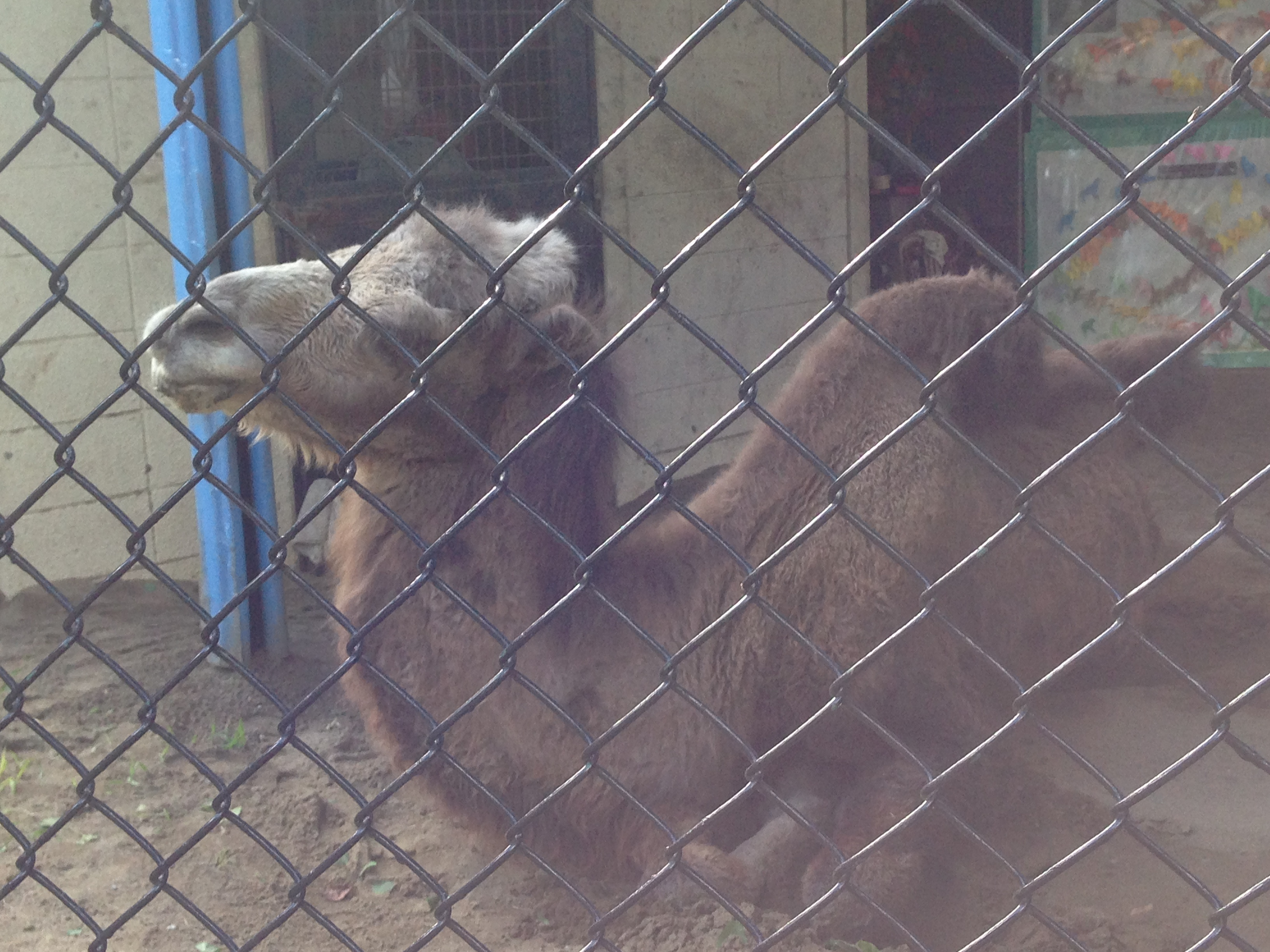 野毛山動物園のja:ツガル(2013年10月16日撮影)